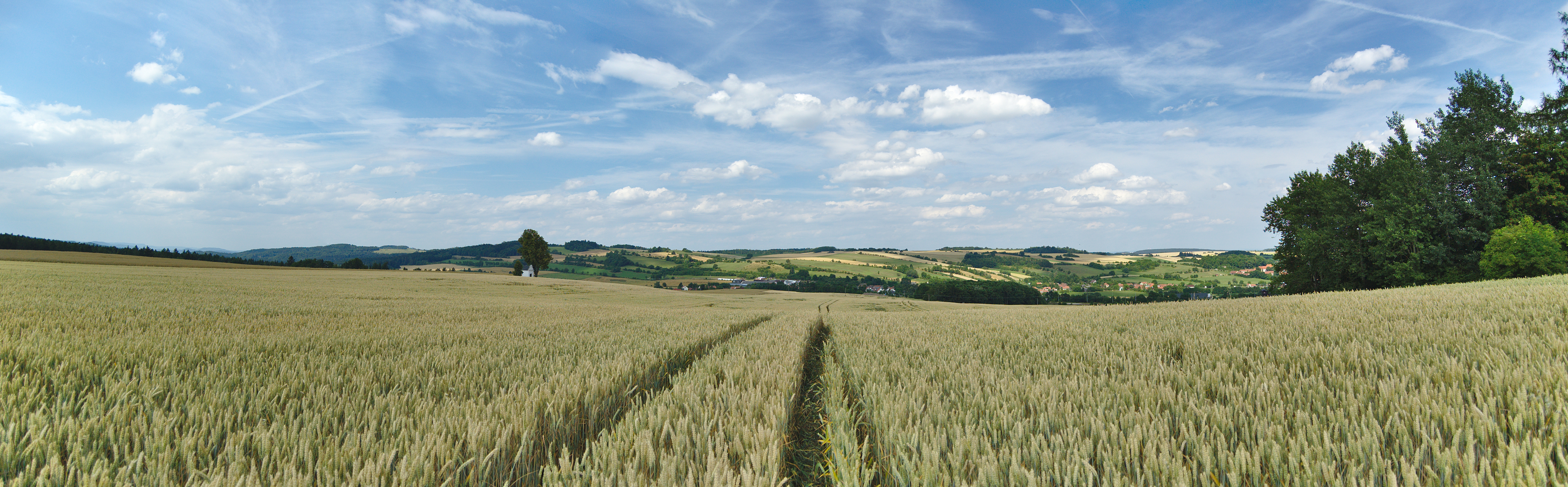 Panorama Jesence a Dzbelu z cesty nad Dzbelem, okres Prostějov